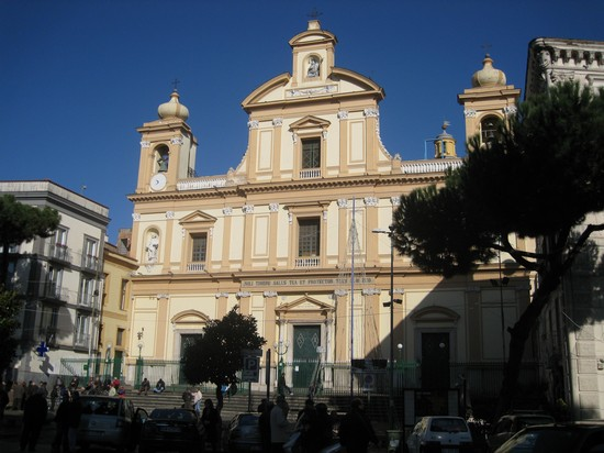 La chiesa principale di Sant'Antimo, in Piazza della Repubblica